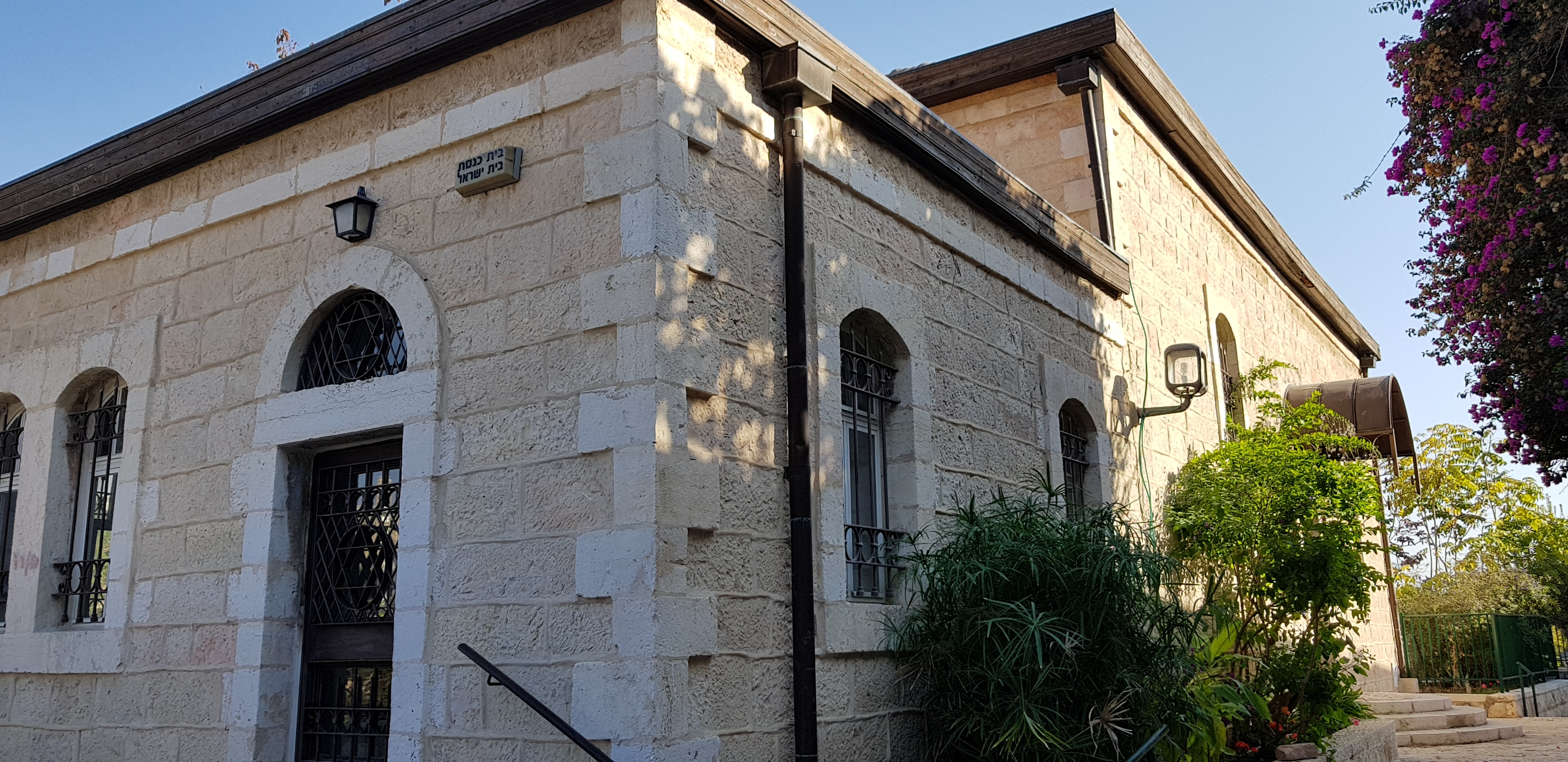 מראה בית הכנסת משביל הכניסה